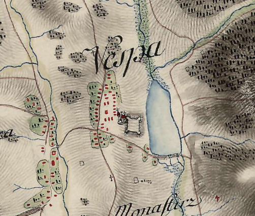 xviii